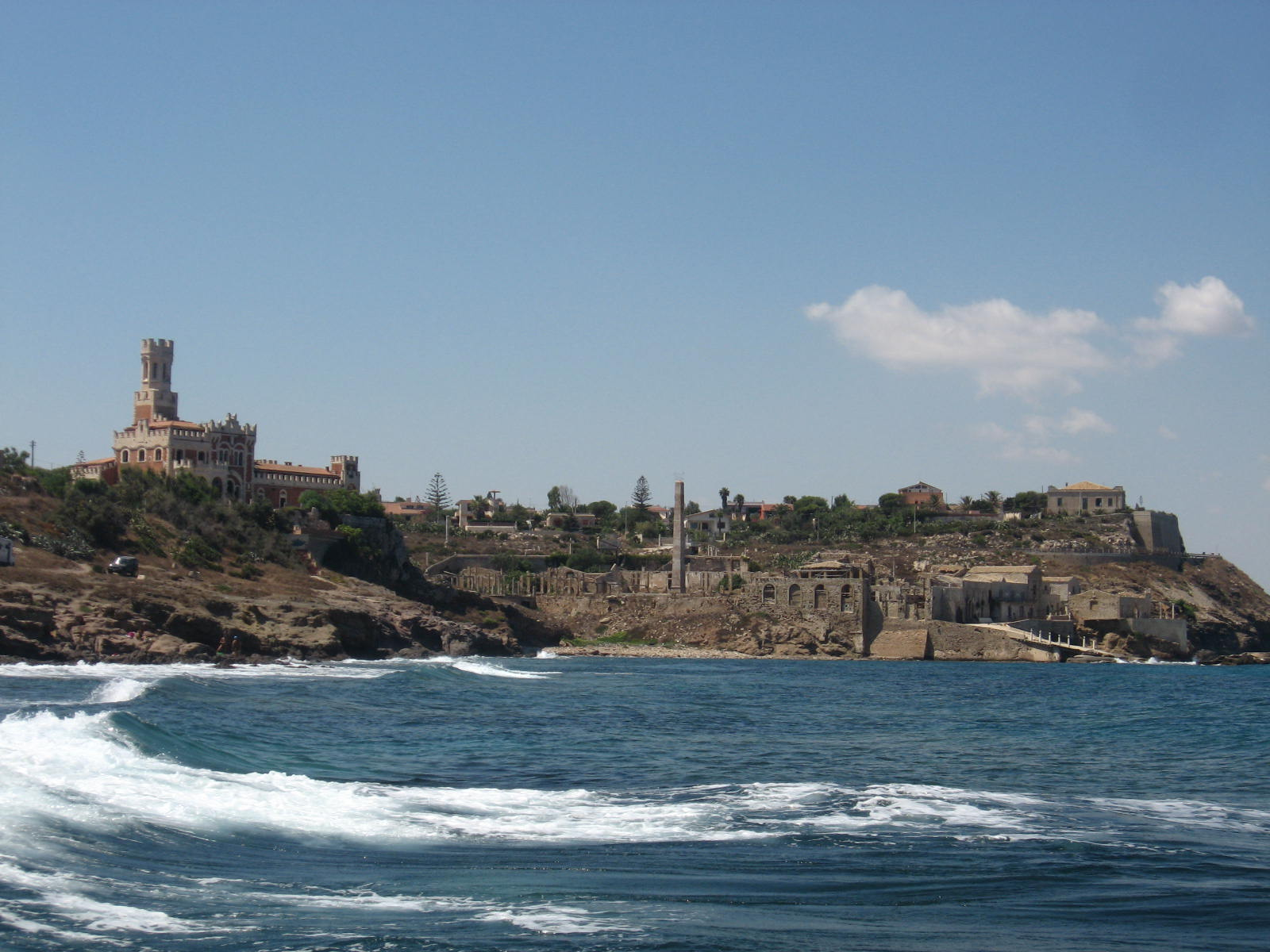 vista della tonnara e del castello